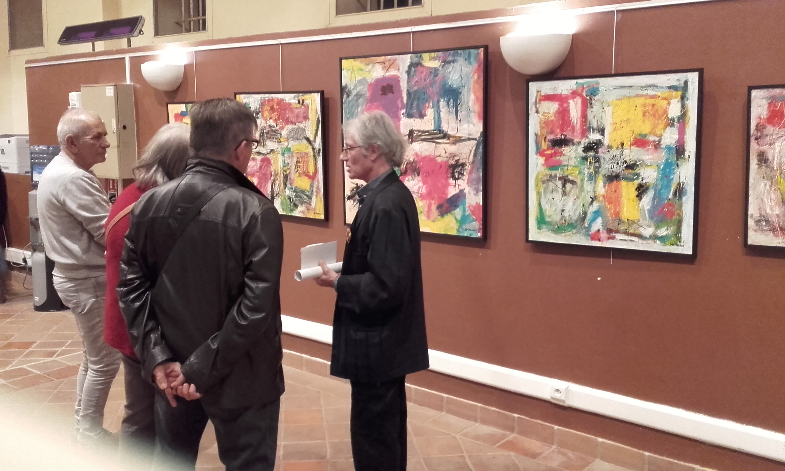 Var, Le-Luc-en-Provence. Exposition de peinture. Espace Tourisme et patrimoine, place Pasteur, accolé à la tour hexagonale édifiée entre 1517 et 1546 . L'exposition du 14 décembre 2018 était présentée par l'artiste Pat Pellerin dans le prieuré St-Pierre, 13ème siècle, avec son abside en cul de four et son chevet plat.